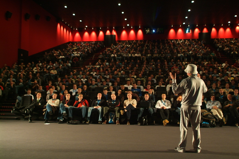 BeJUG